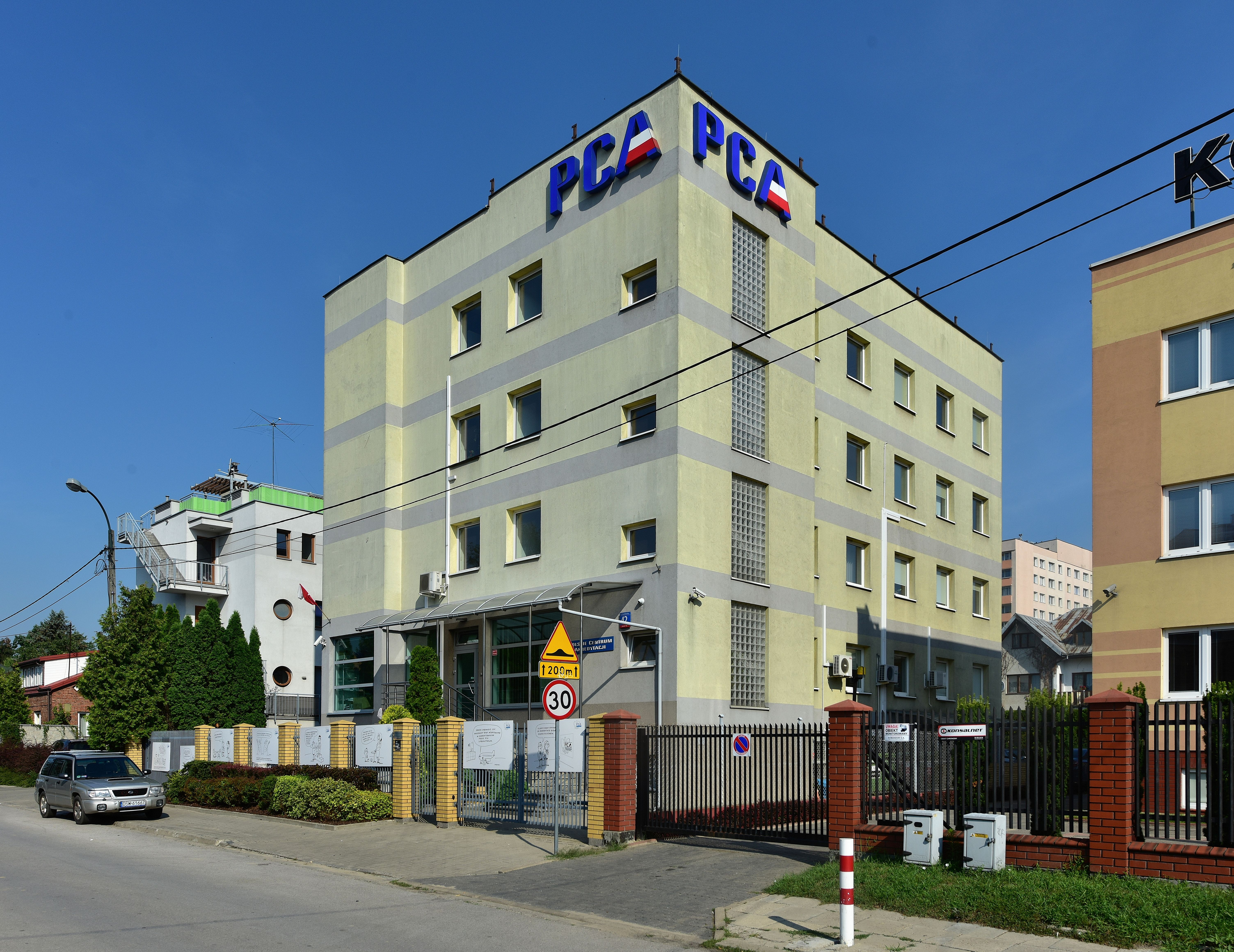 Polskie Centrum Akredytacji przy ul. Szczotkarskiej 42 w Warszawie